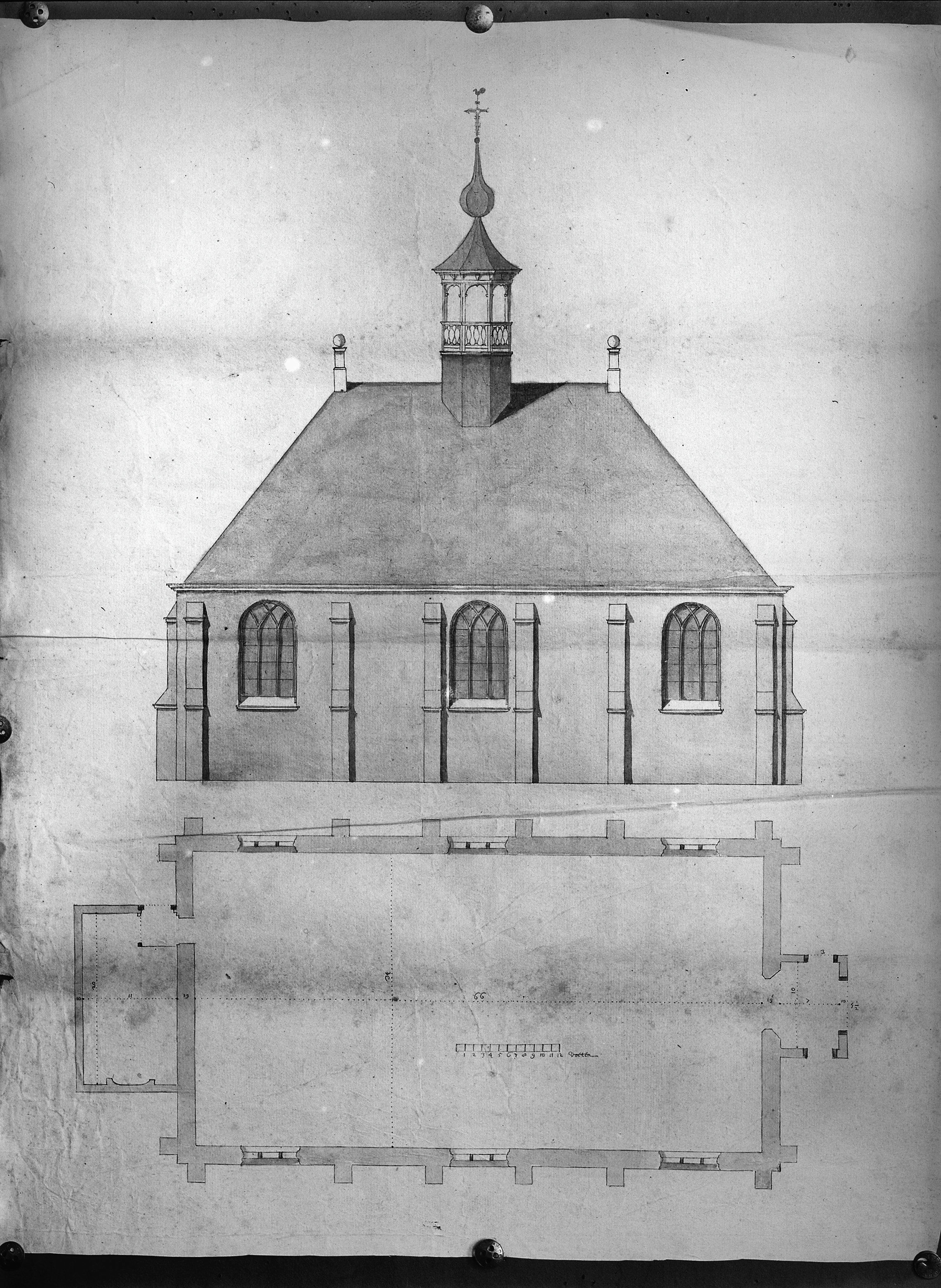 Nederlands Hervormde Kerk: schetsplan kerk in het Algemeen Rijksarchief